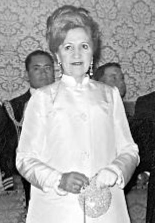 Corina del Parral (de Velasco Ibarra), en el Salón Amarillo del Palacio de Carondelet. Alrededor de 1940